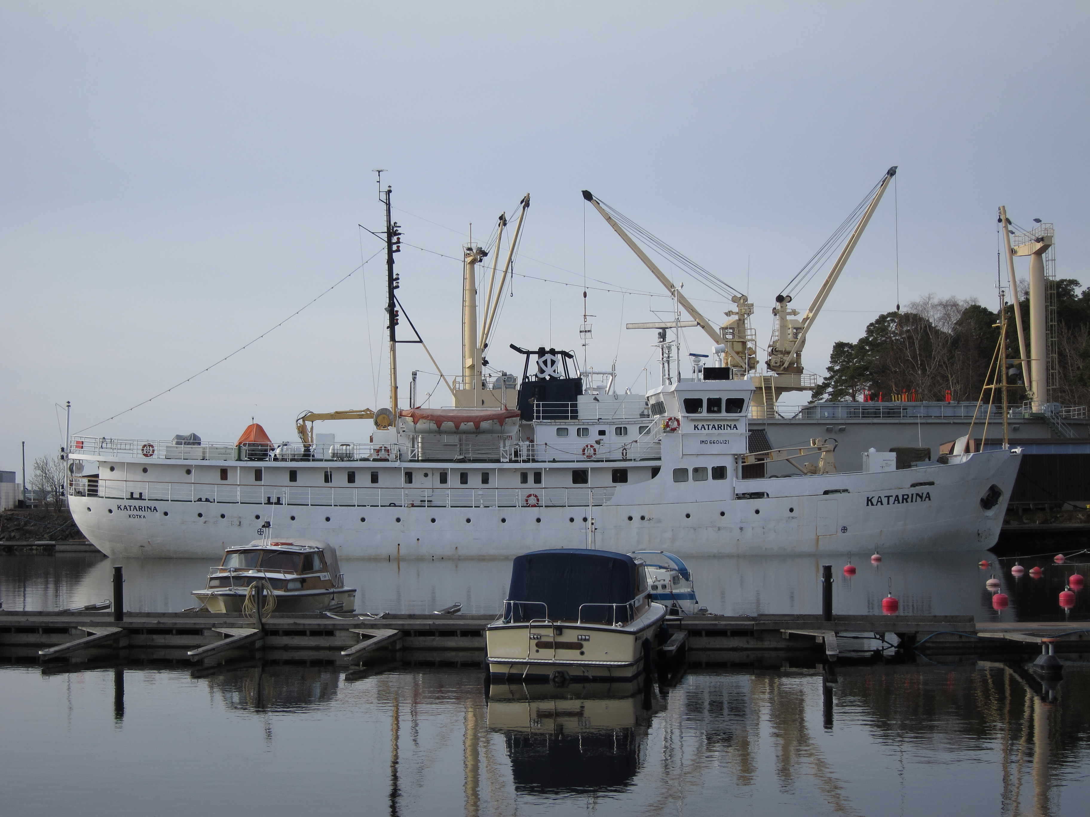 M/S Katarina, merenkulun opetuksen koululaiva Kotkassa, entinen matkustajalaiva ja merentutkimusalus M/S Aranda.